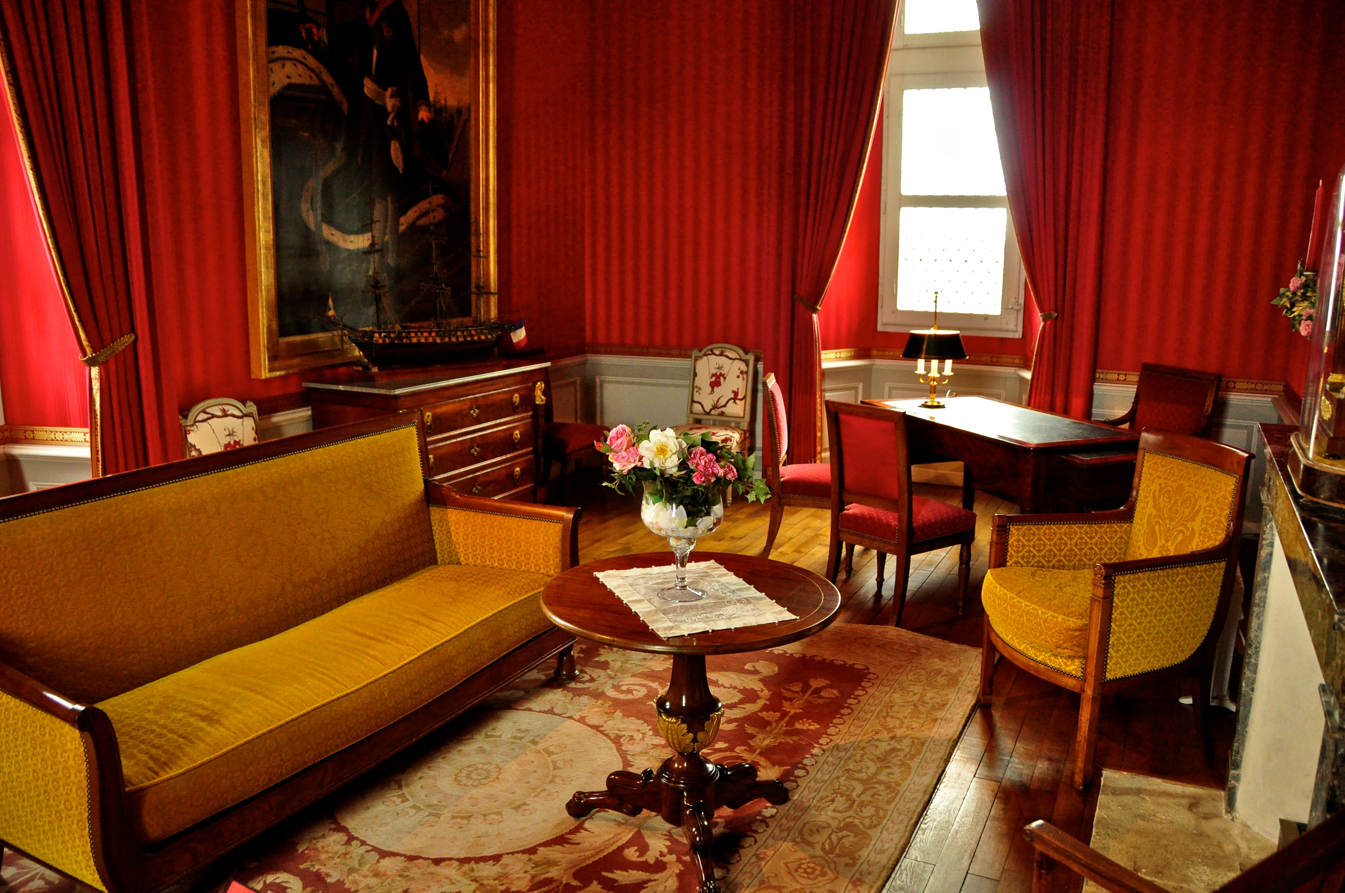 Arbeitszimmer Louis-Philippes im Schloss Amboise